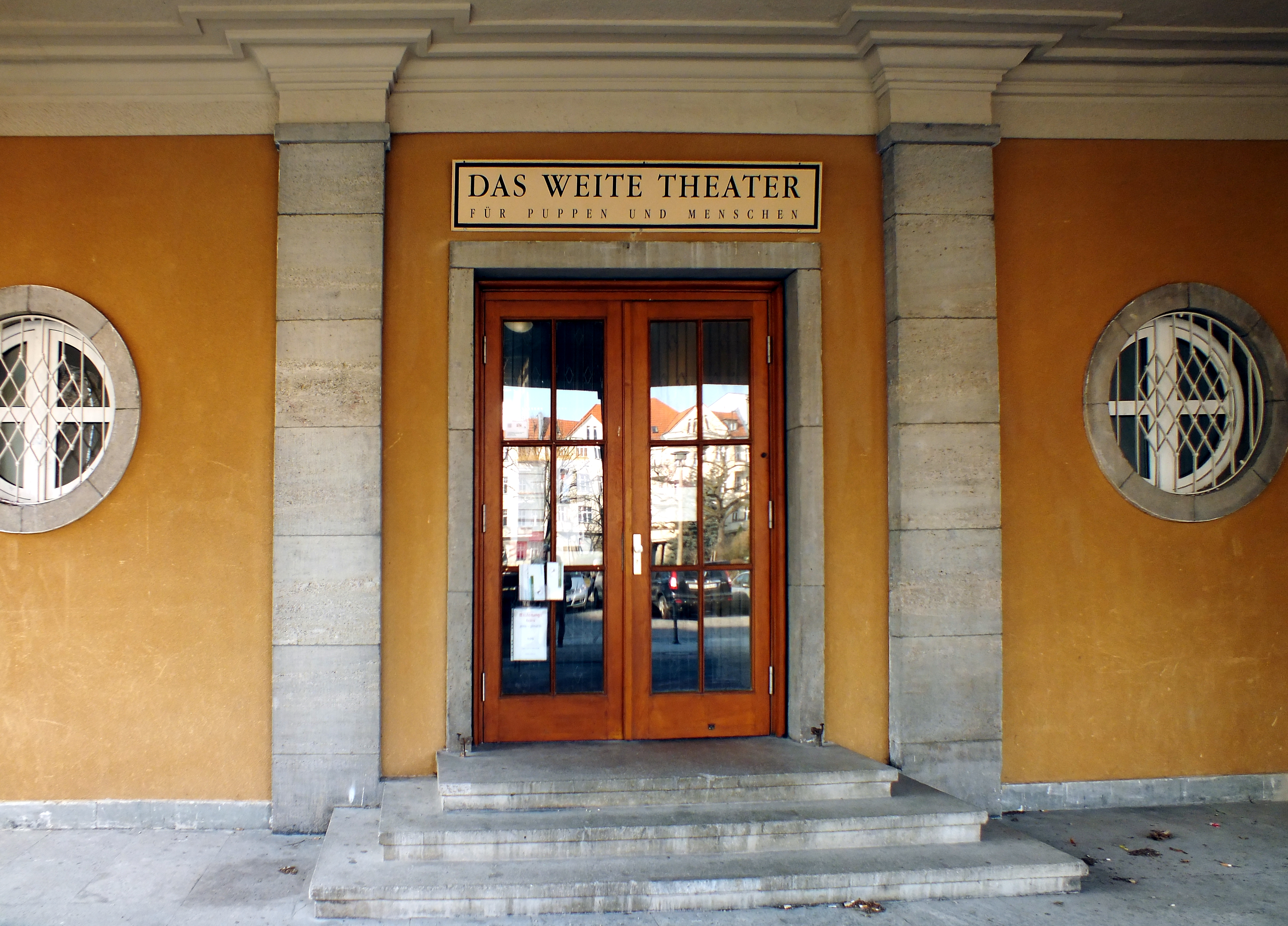 Das Weite Theater, Lichtenberg, Parkaue 25